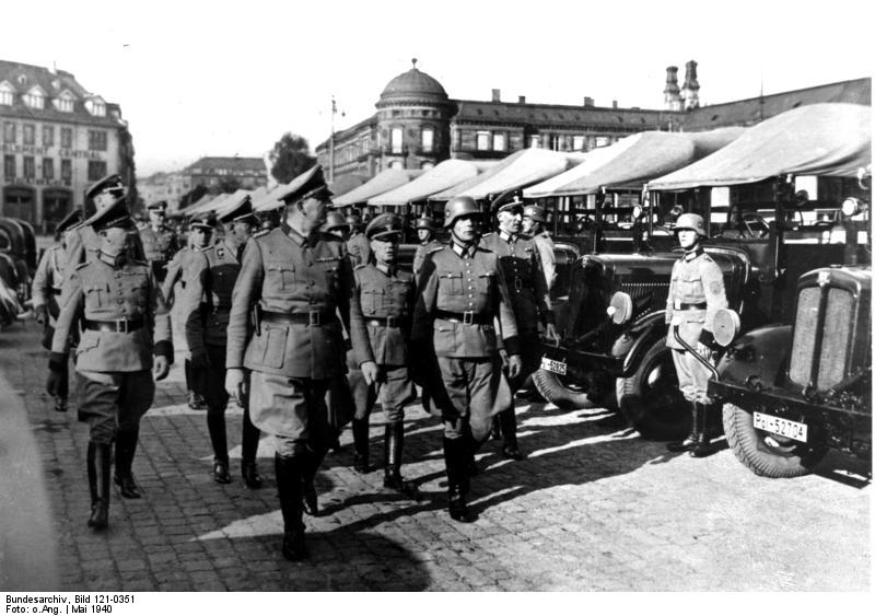 Besichtigung in Straßburg von Polizei-Einheiten, 1940 (Mitte) Daluege, Gen.Mj. v. Bomhard, Oberst d. Pol. Winkler